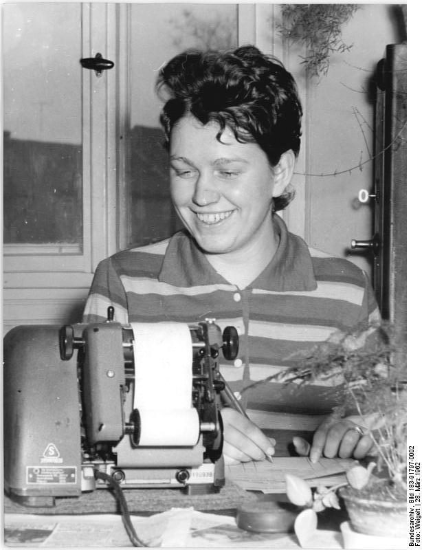 LPG Kerspleben, Buchhalterin Zentralbild Weigelt N1-Qu 28.3.1962 Ursula Saul bleibt der Heimat-LPG treu "Meine Zukunft liegt in der LPG", sagte Ursula Saul (unser Bild) aus der 'LPG "Johannes Dunger" in Kerspleben (Kreis Erfurt). Nach zweijähriger Tätigkeit als Buchhalterlehrling in der LPG schließt sie jetzt ihren Facharbeiterbrief für Buchhalter ab. In Anschluß wird sie für 3 Jahre die Fachschule in Weimar besuchen, um nach Beendigung des Studiums die Arbeit al Buchhalterin in ihrer Heimat-LPG aufzenehmen. "Das Dorf verlassen - einen solchen Gedancken hat es bei mir noch nie gegeben. Ich bleibe meinen Dorf treu", sagte sie.